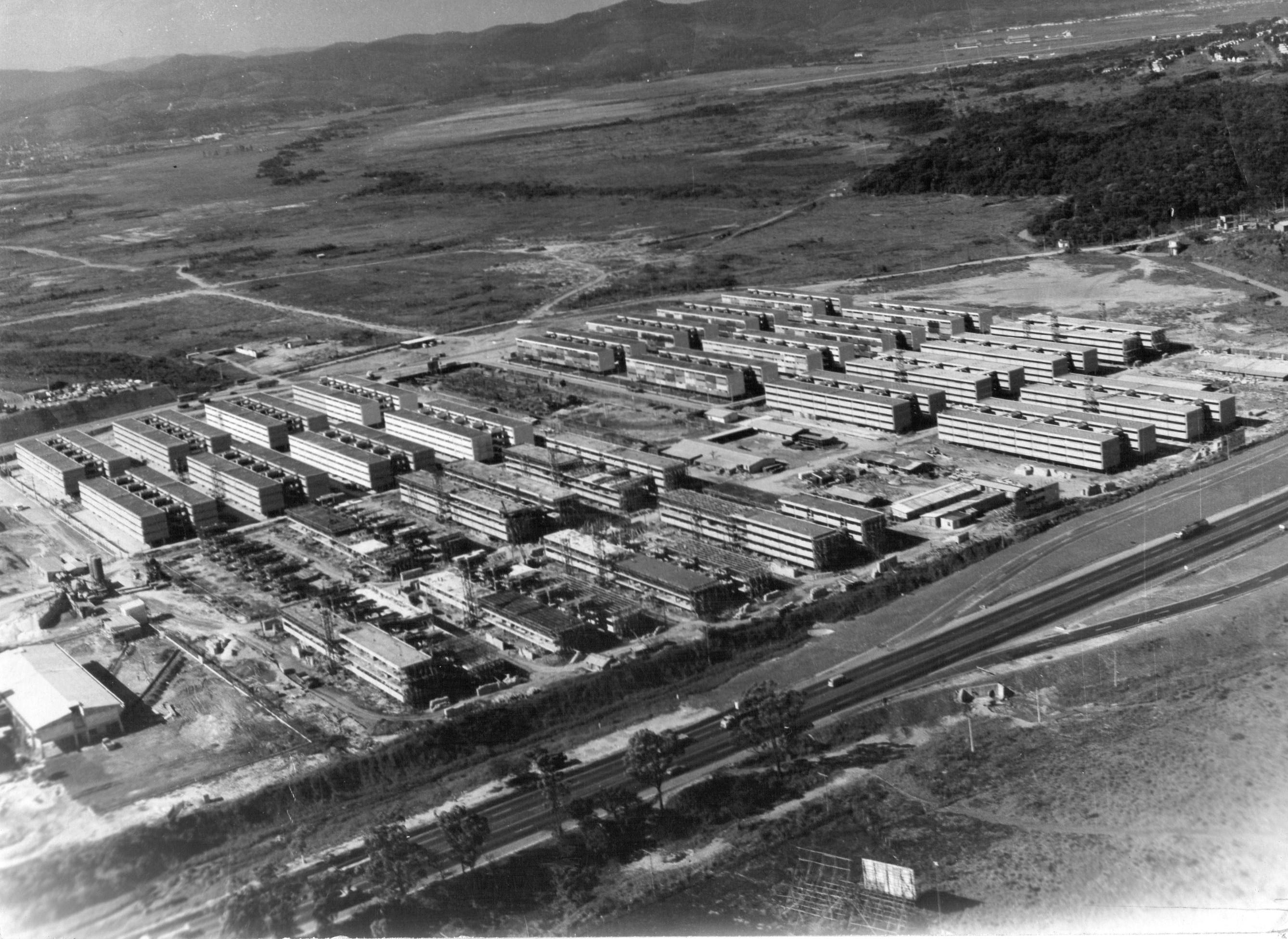 Vista aerea do Parque CECAP em contrução - Projeto de Vila Nova Artigas